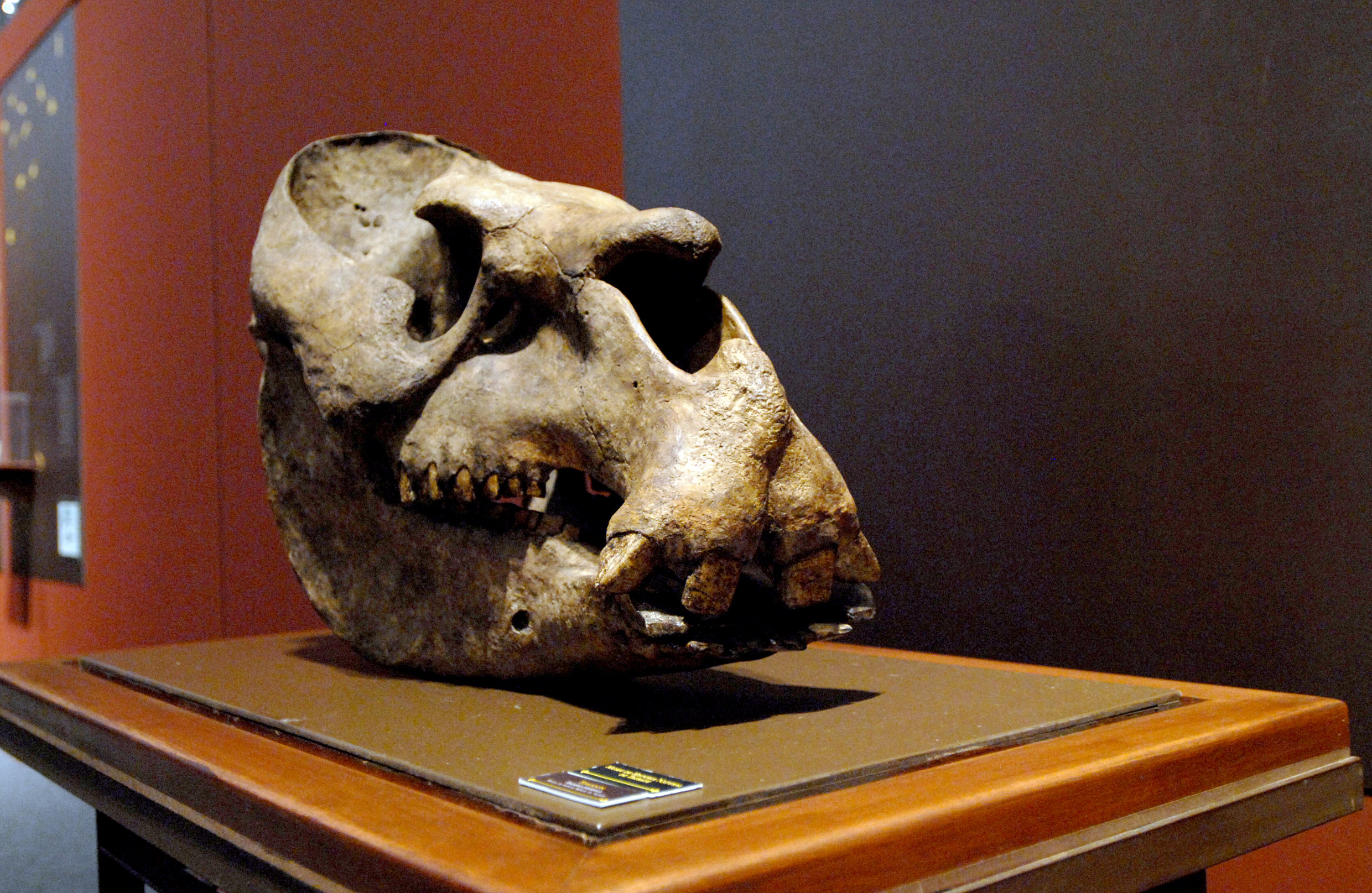 Exposição que marca os 200 anos do nascimento do naturalista Charles Darwin, na Esplanada dos Ministérios, em Brasília Toxodon skull.